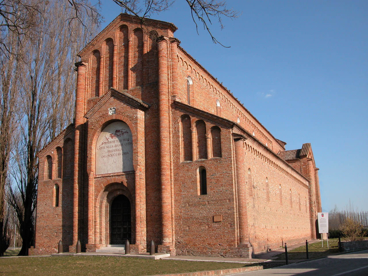 Sorta nel 1082, per opera della contessa Matilde di Canossa, sul dosso omonimo. Il tempio, a 3 navate con 3 absidi curve, è d’impianto basilicale, con solide, massicce colonne in cotto e cripta. Elementi originali, nel più ampio discorso delle chiese matildiche mantovane e del romanico italiano, sono la facciata mediana e il motivo delle tre absidi segnate da mezze colonne. Nel corso dei secoli molti artisti contribuirono a decorare l’edificio, anche se purtroppo opere rilevanti di pittori come il Pinturicchio e il Ghirlandaio sono andate perdute. Numerosi restauri hanno cercato di riportare la chiesa all’aspetto originario; quello più impegnativo risale al 1932, quando vennero riedificate intere parti andate distrutte e l’edificio divenne Famedio dei Caduti.